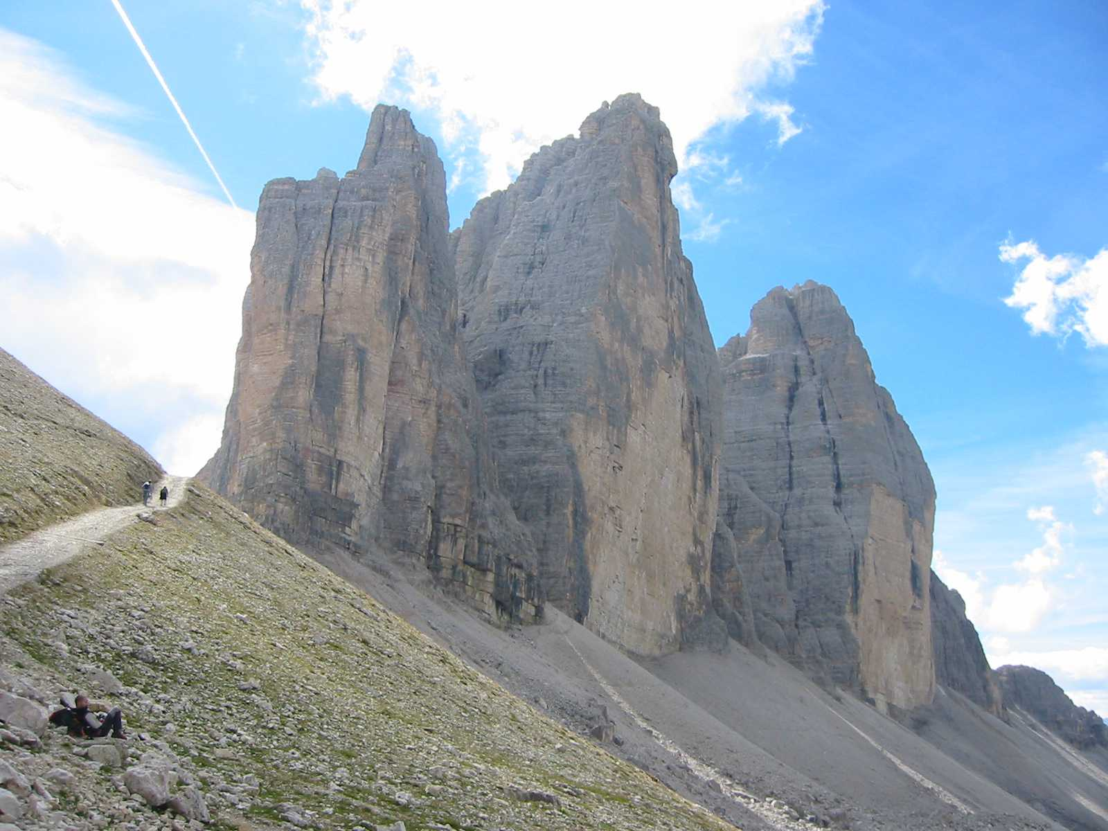 Drei Zinnen